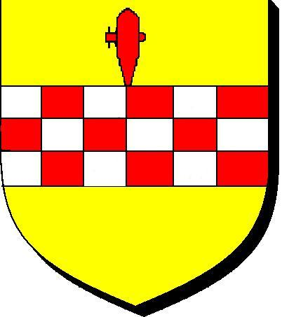 blason des spinola famille Génoise ayant une branche en France d'or à une fasce échiquetée de trois traits d'argent et de gueules, surmonté d'un espile (ou robinet en Italien spina di botte) de gueules en pal fichée dans la fasce. D'oro alla fascia scaccata di tre file d'argento e di rosso, accostata in campo da une spina di botte in palo di rosso